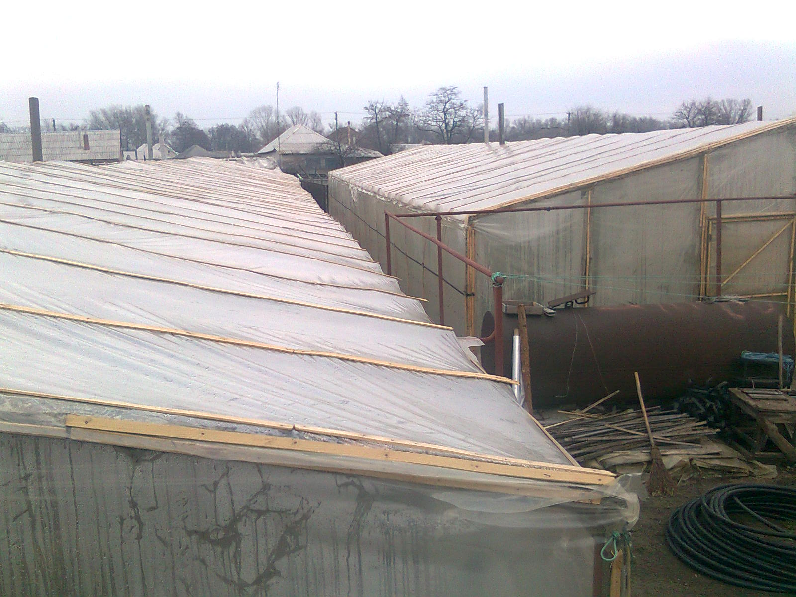 плёночная теплица